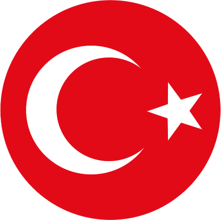 Türk millî takımlarının forma göğüs arması olarak taşıdığı oval Türk bayrağı.